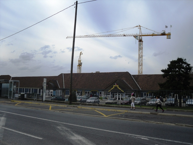 Le centre culturel Georges Brassens de Vigneux-sur-Seine (91)